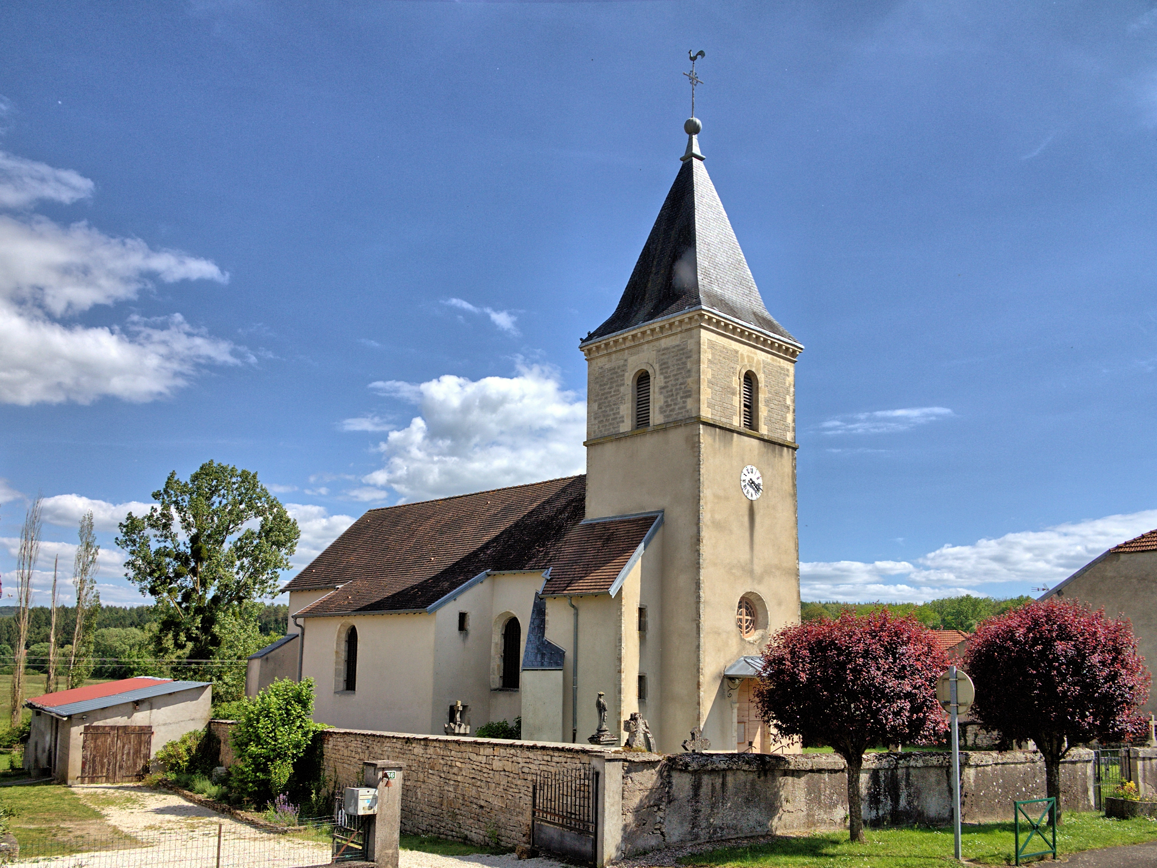 L'église Saint-Antide